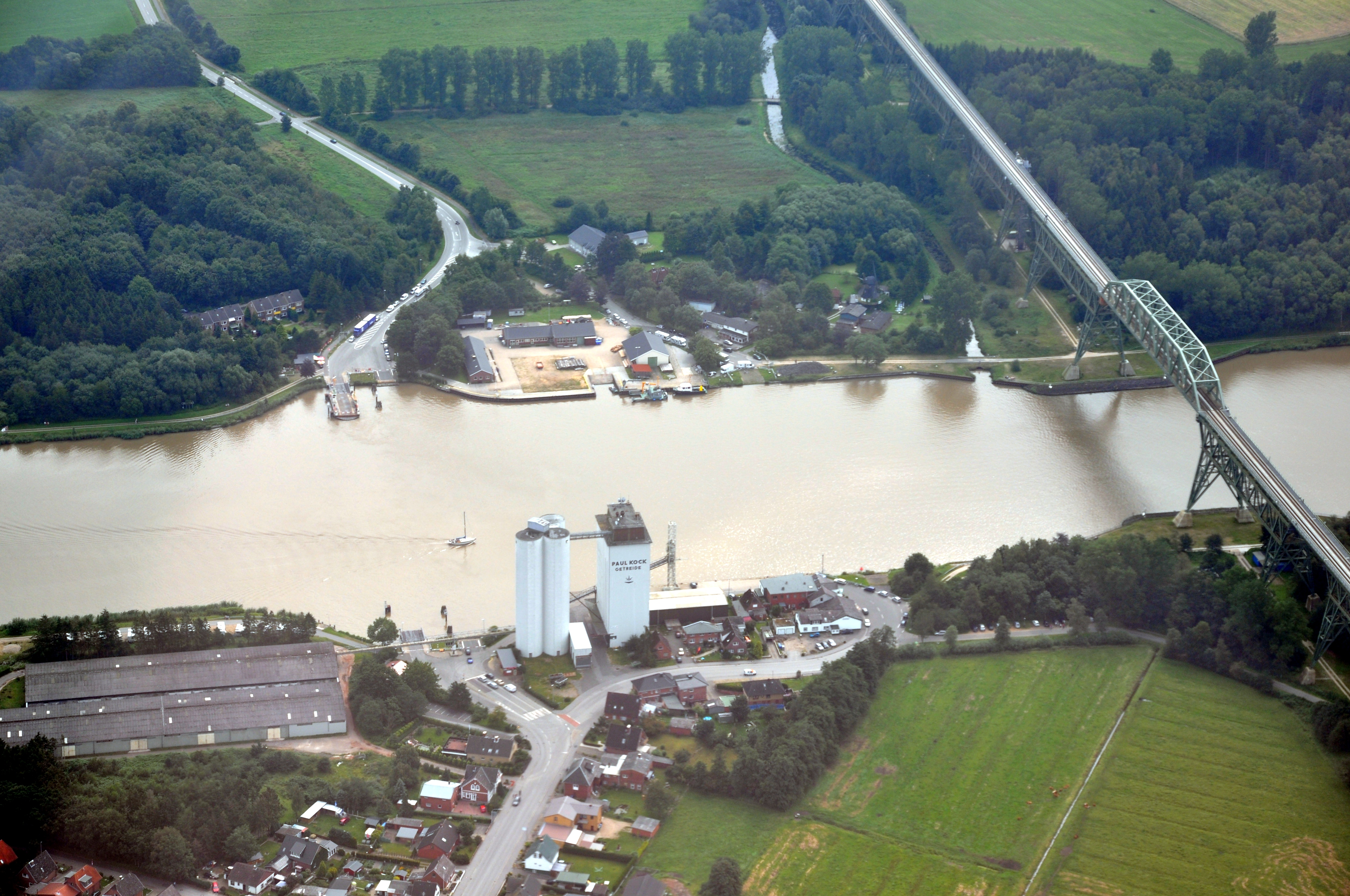 Fähre und Brücke in Hochdonn, Blickrichtung etwa in Richtung Osten